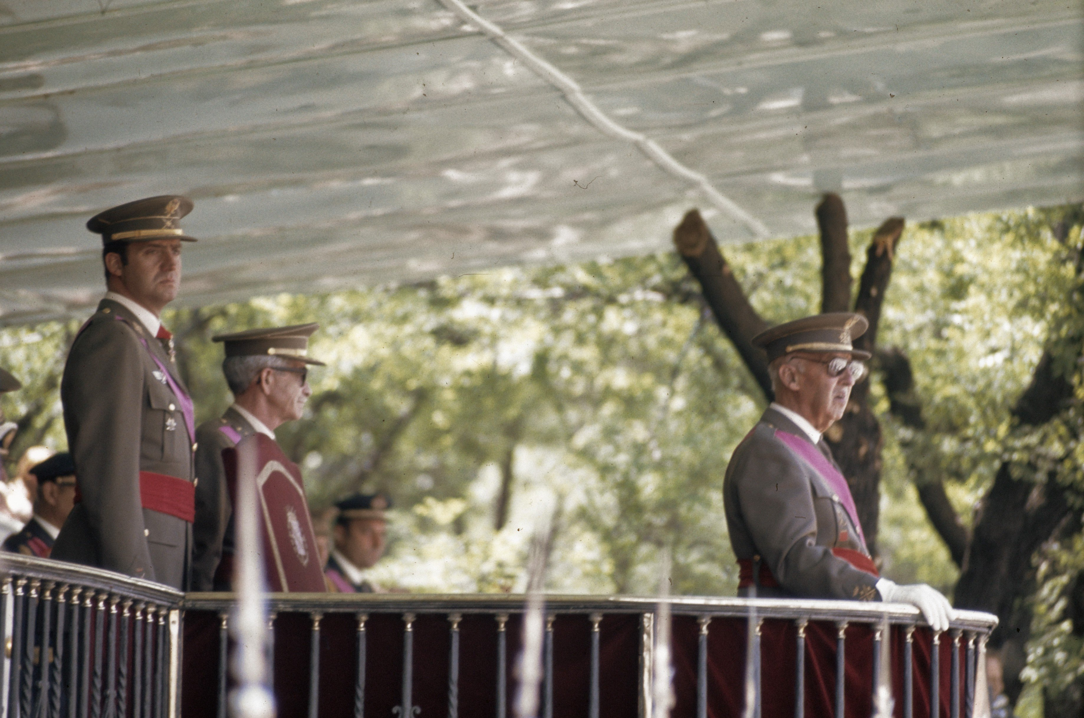 Collectie / Archief : Fotocollectie Anefo Reportage / Serie : [ onbekend ] Beschrijving : Generaal Franco (rechts) en Prins Juan Carlos Datum : november 1975 Trefwoorden : GENERAALS Persoonsnaam : Franco, Juan Carlos, prins van Spanje Fotograaf : [onbekend] Auteursrechthebbende : Nationaal Archief Materiaalsoort : Dia (kleur) Nummer archiefinventaris : bekijk toegang 2.24.01.06 Bestanddeelnummer : 254-9762